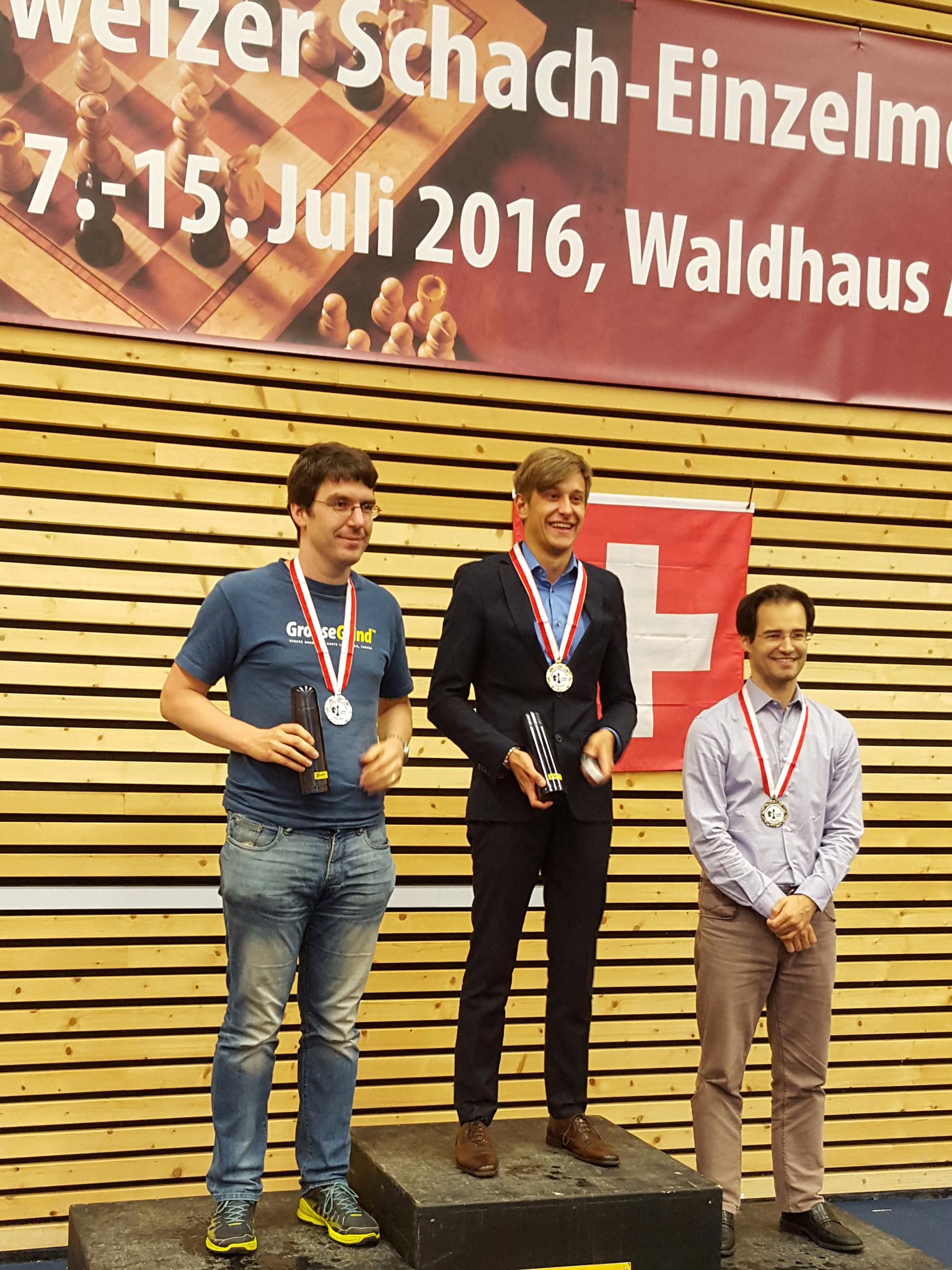 Siegerehrung bei der SEM 2016 in Flims. V.l.n.r.: Roland Lötscher (2.), Noël Studer (1.), Yannick Pelletier (3.).